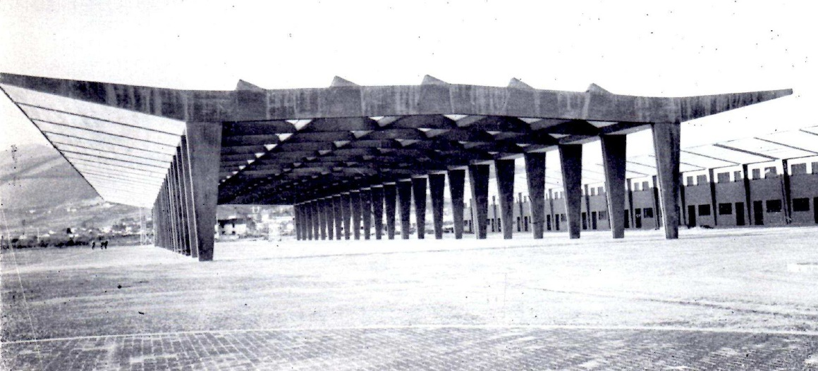 Tettoia dei Produttori presso il Mercato Ortofrutticolo di Novoli, Firenze